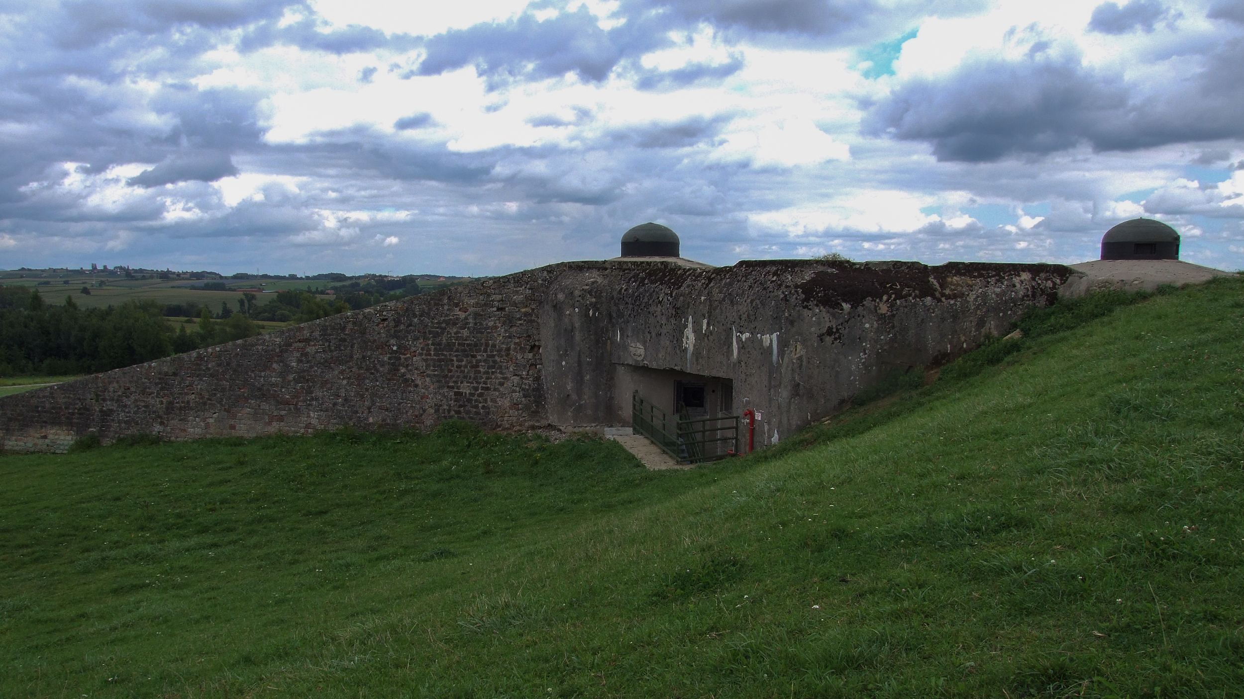 Fort de Schoenenbourg der Ligne Maginot, Elsass, Frankreich.